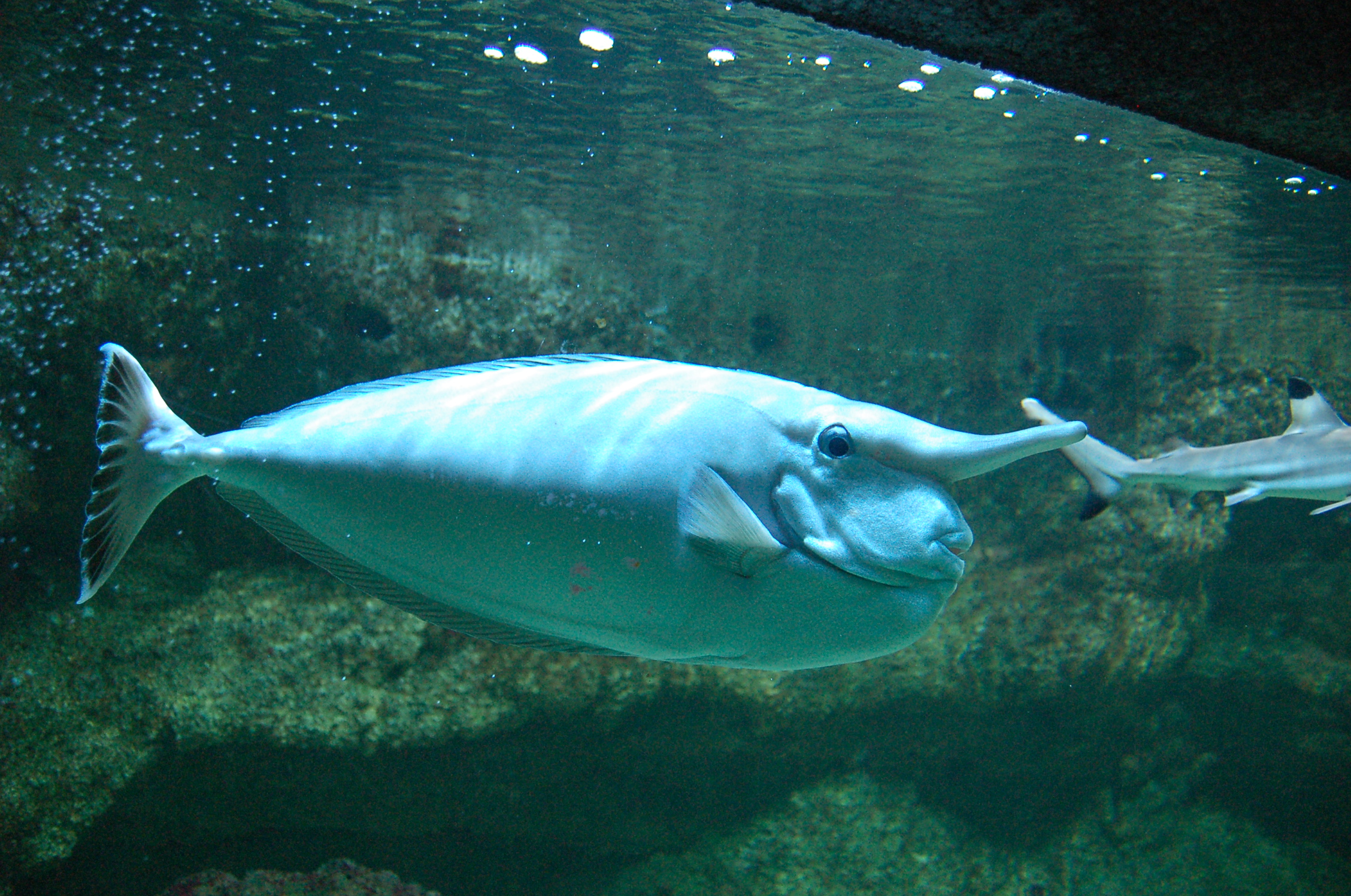 Poisson licorne - Naso annulatus Aquarium tropical du Palais de la Porte Dorée. Paris. France.